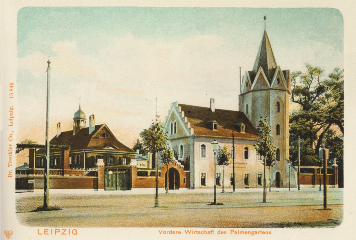 Der Kuhturm in Leipzig-Lindenau, auch Vordere Wirtschaft des Palmengartens, 1902